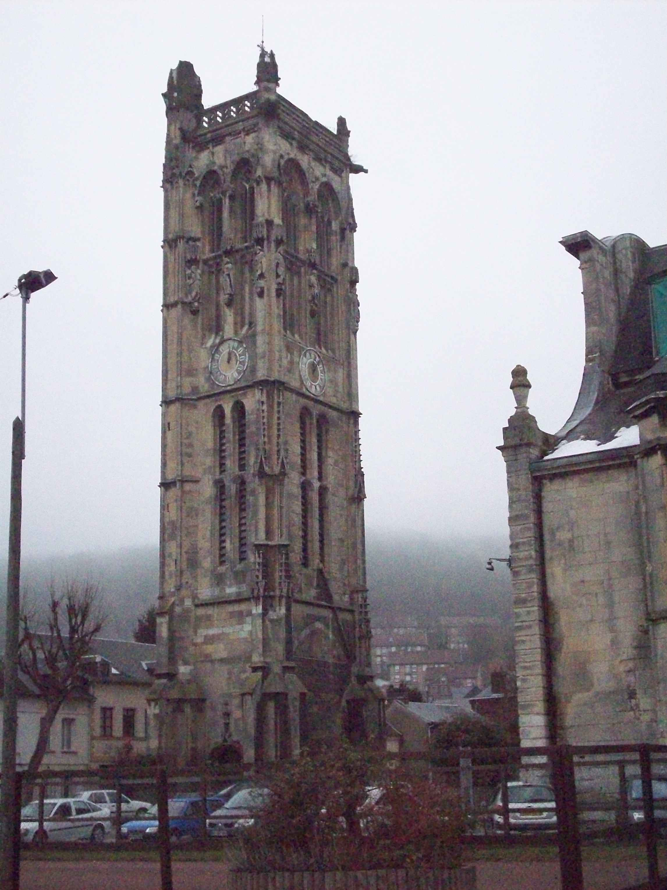 Tour de Carville (clocher de l'église).